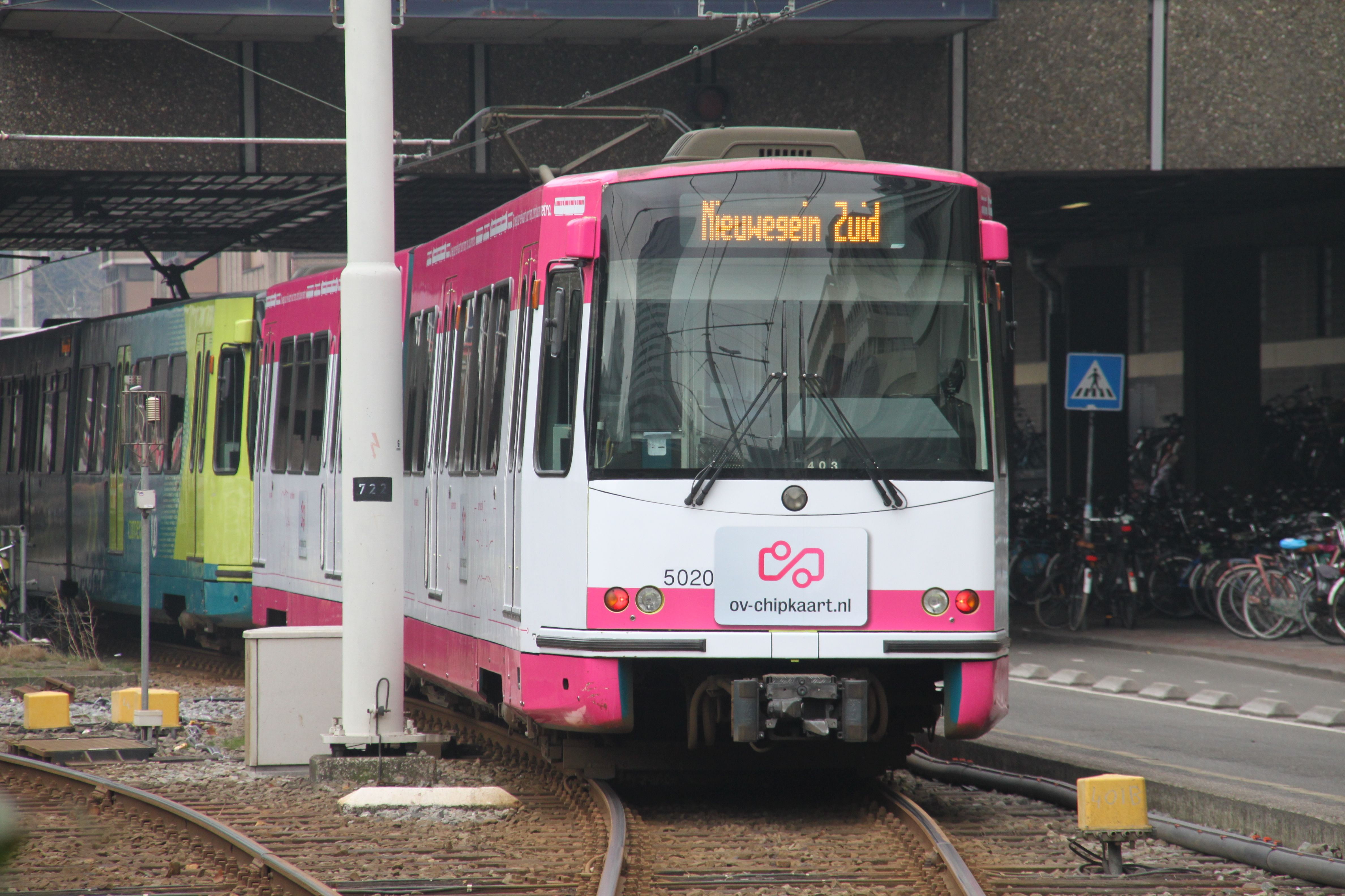 Utrechtse sneltram met reclame voor de OV-chipkaart